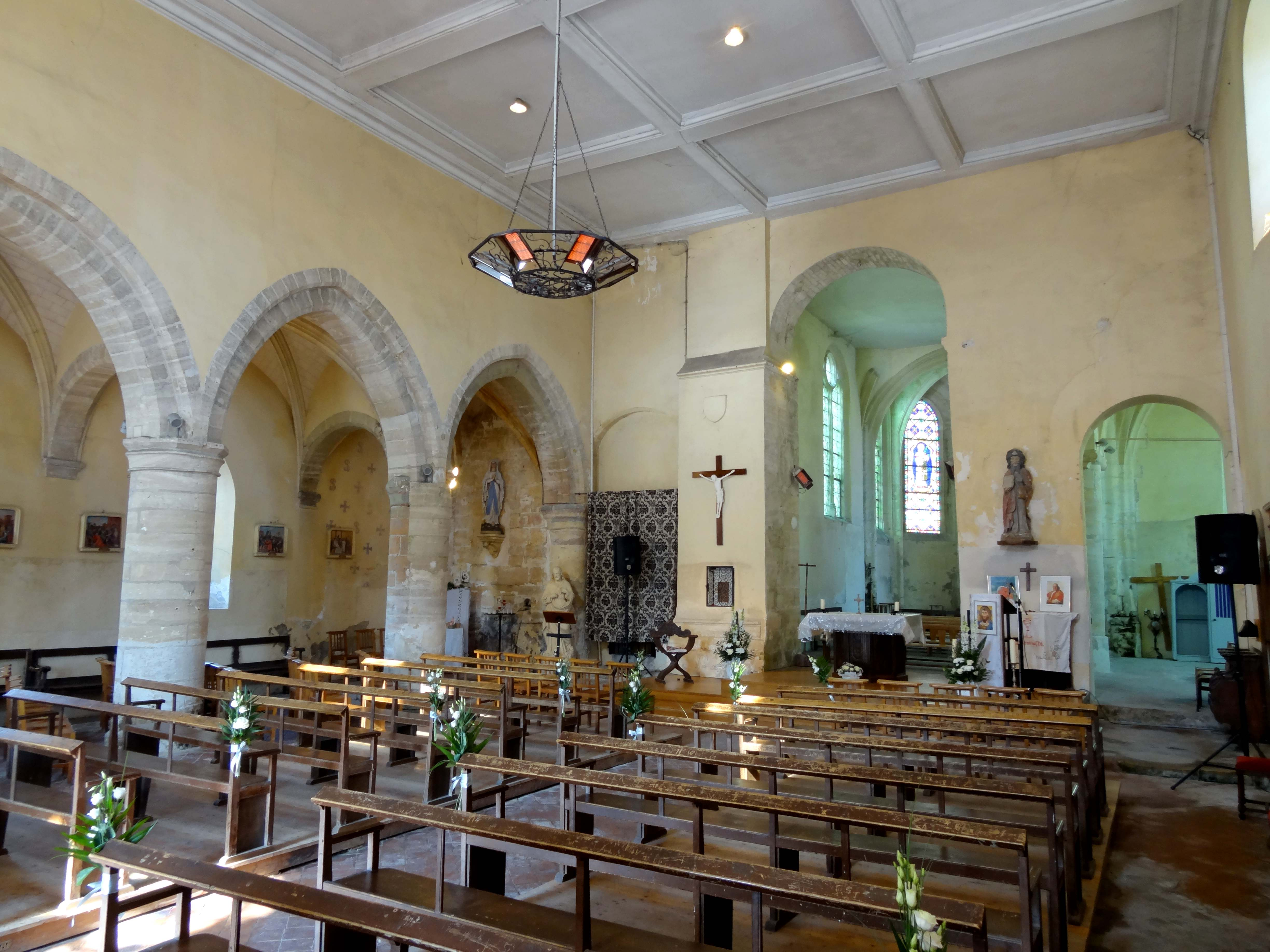 Intérieur de l'église - voir titre.